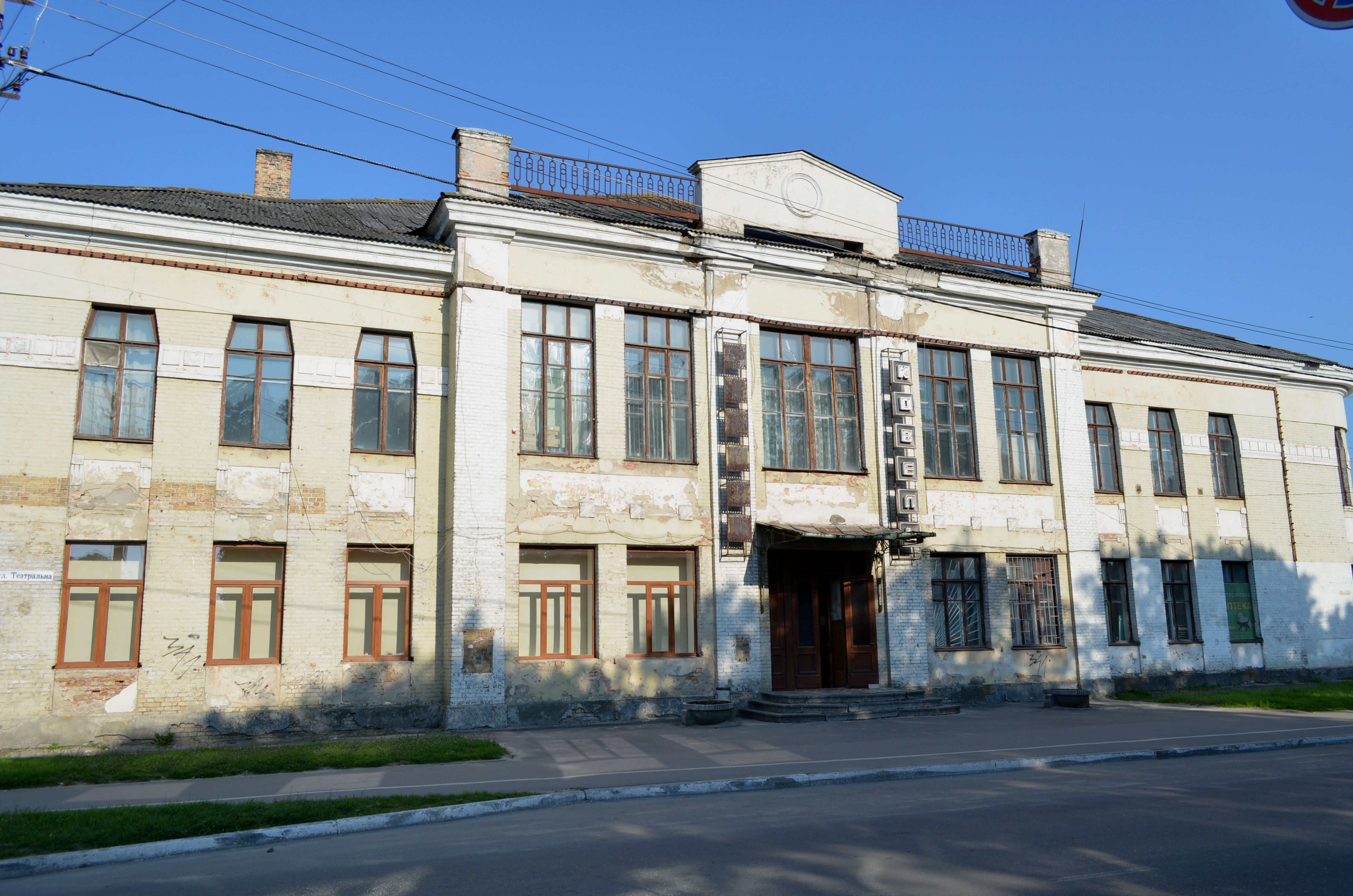 Споруда колишньої школи (мур.), Ковель, вул. Театральна, 11